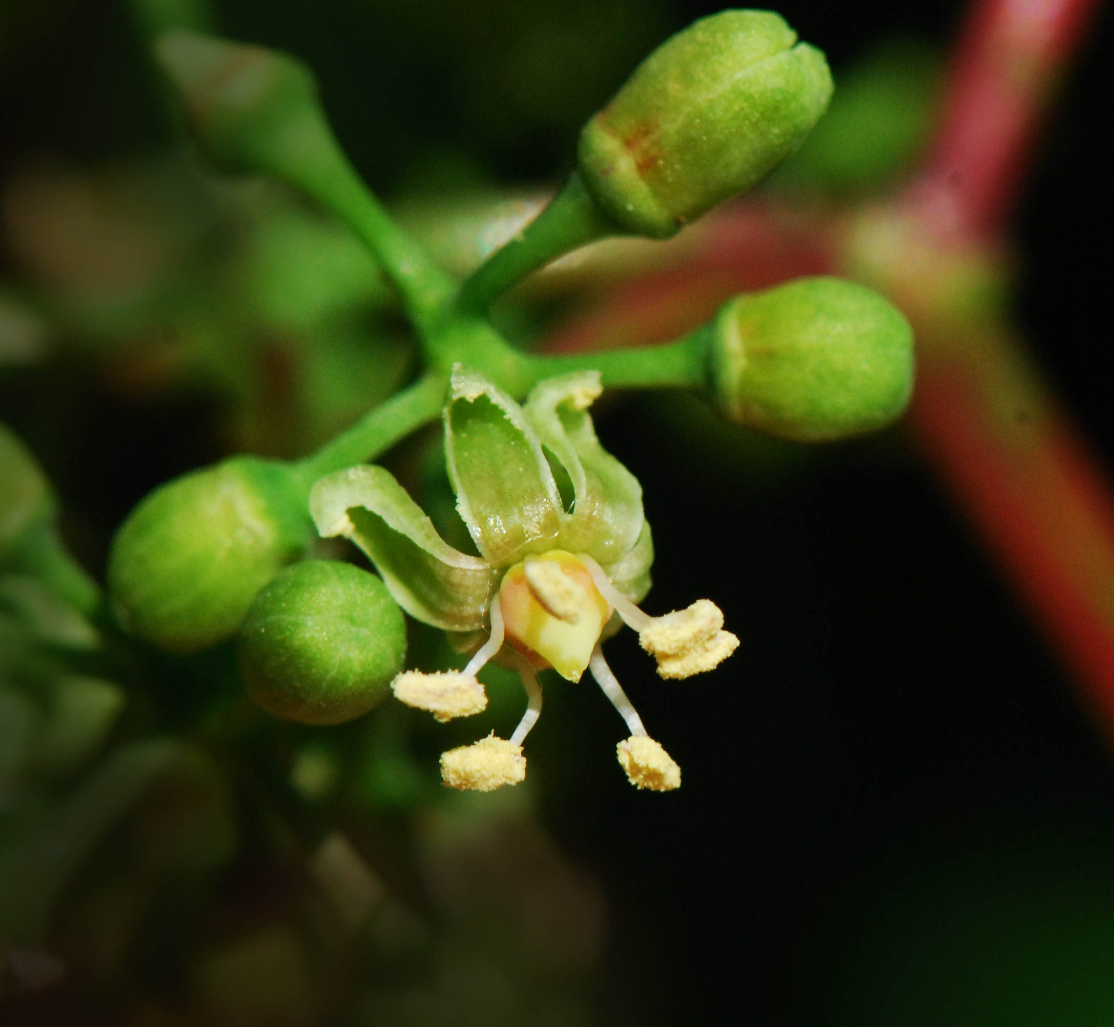 Parthenocissus quinquefolia,fleur, Paris